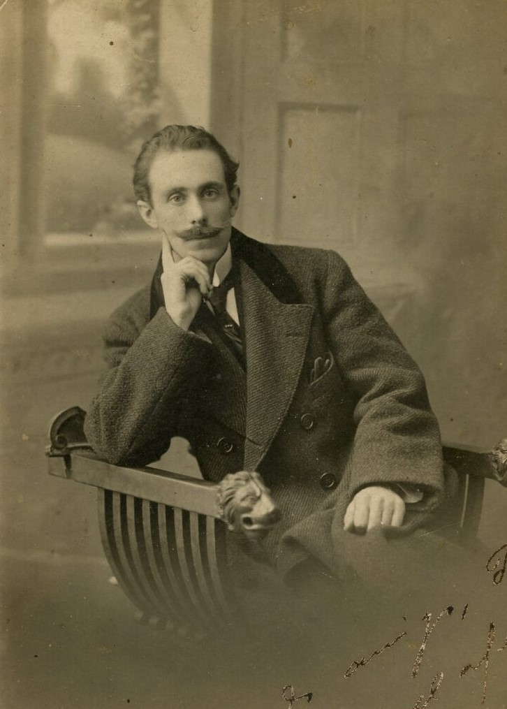 Mariano Lautaro Latorre Court (Cobquecura, 4 de enero de 1886 - Santiago de Chile, 10 de noviembre de 1955), escritor chileno